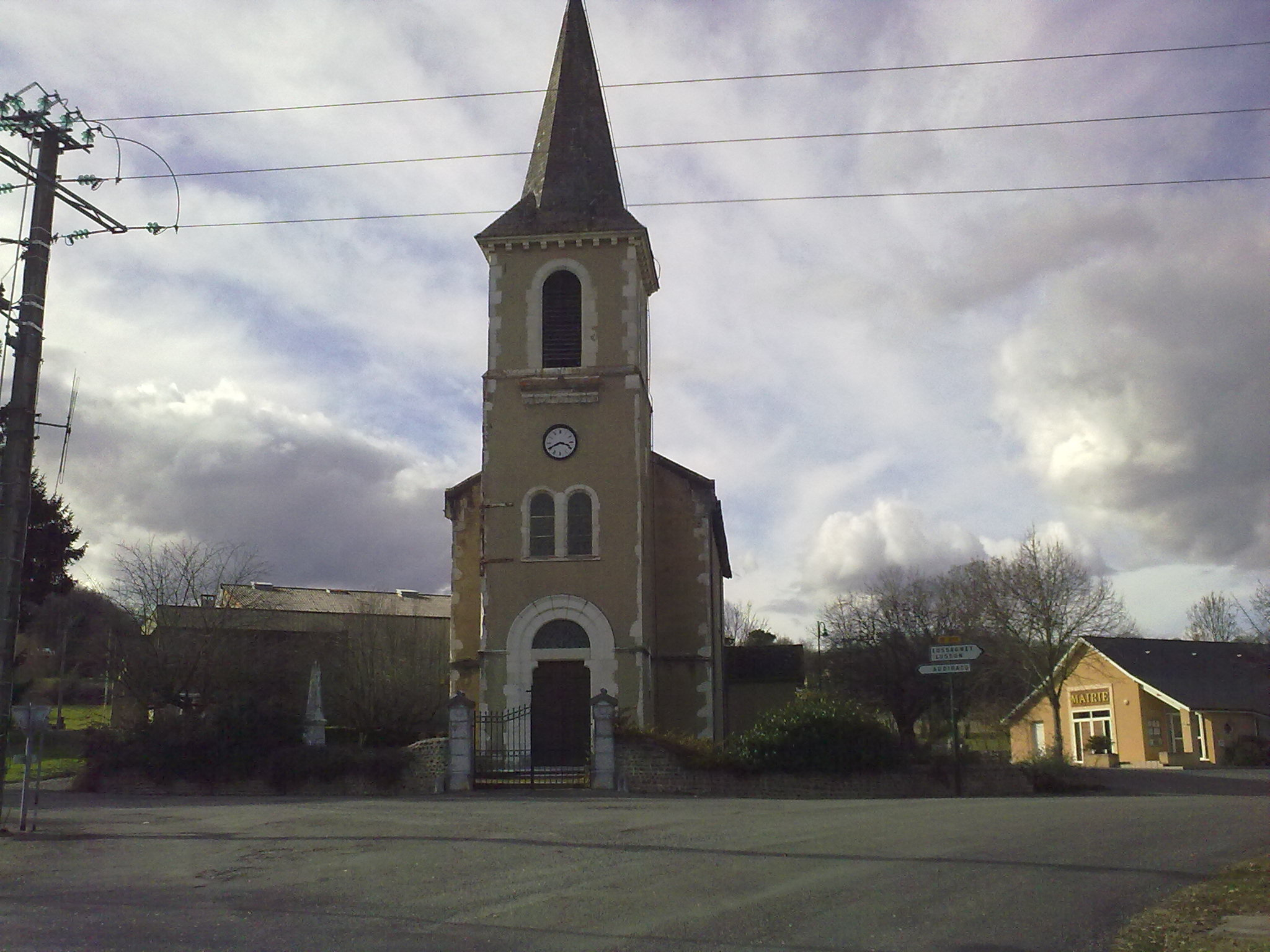 Eglise de Monassut - Audirac ( Vue 2 )